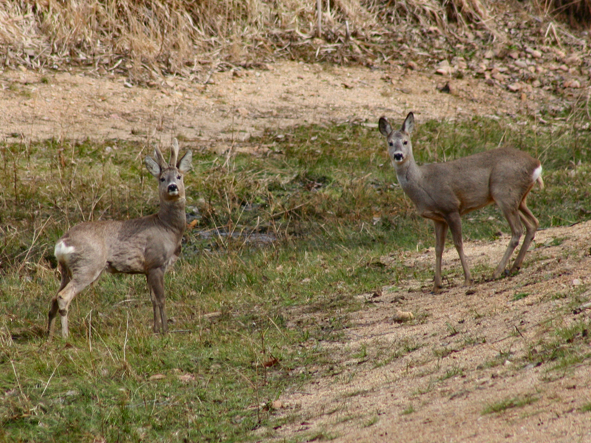 Capreolus capreolus Sarna, Roe Deer.